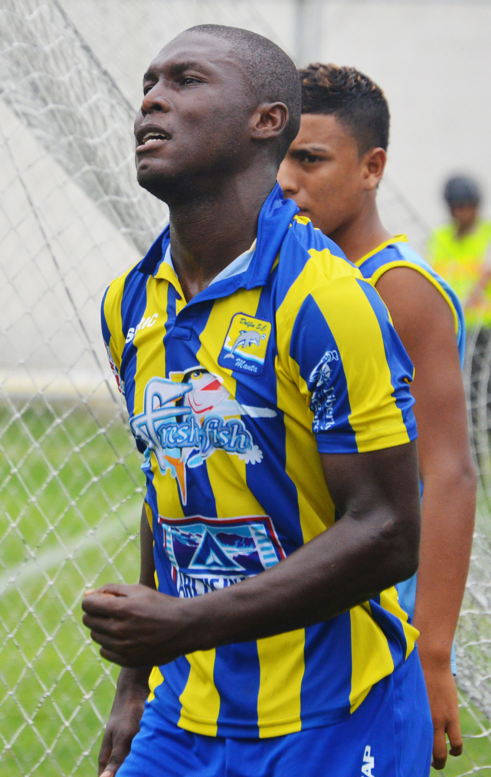 José Caicedo en Delfín Sporting Club de Manta en 2014